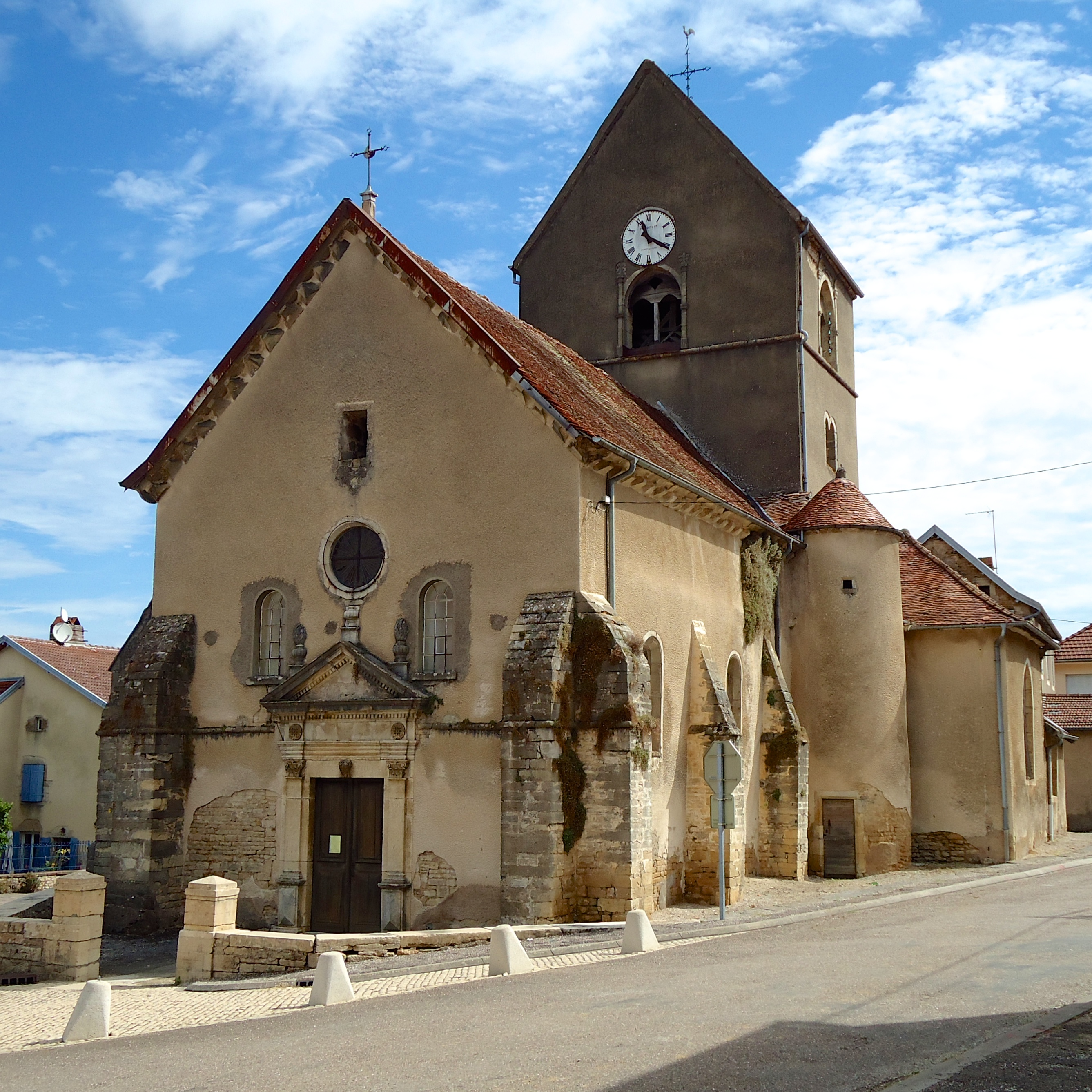 L'église de Purgerot